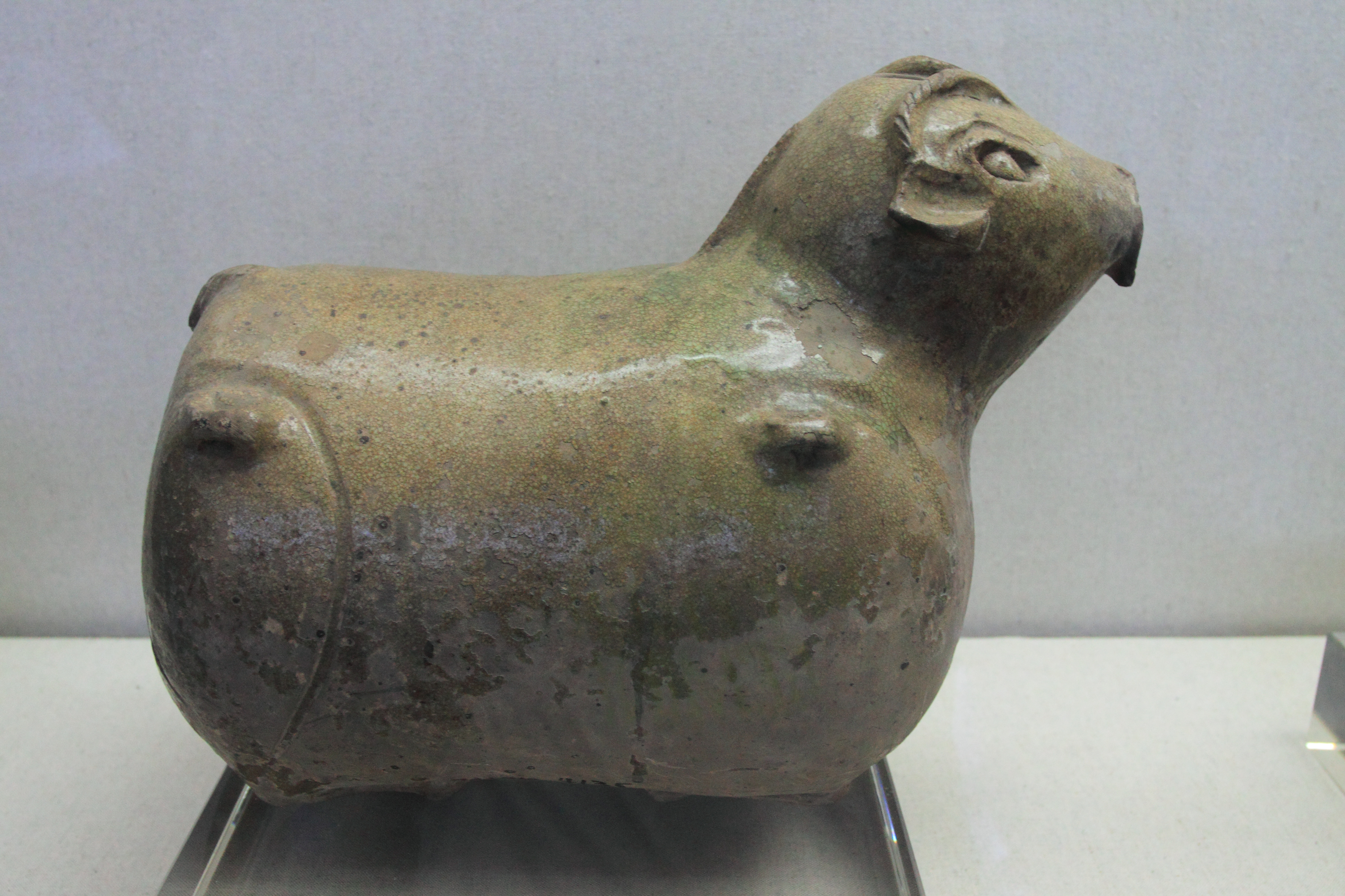 江西省博物馆（位于中国江西省南昌市）藏品——青瓷四系羊尊，西晋，1974年湖口县江桥公社出土。